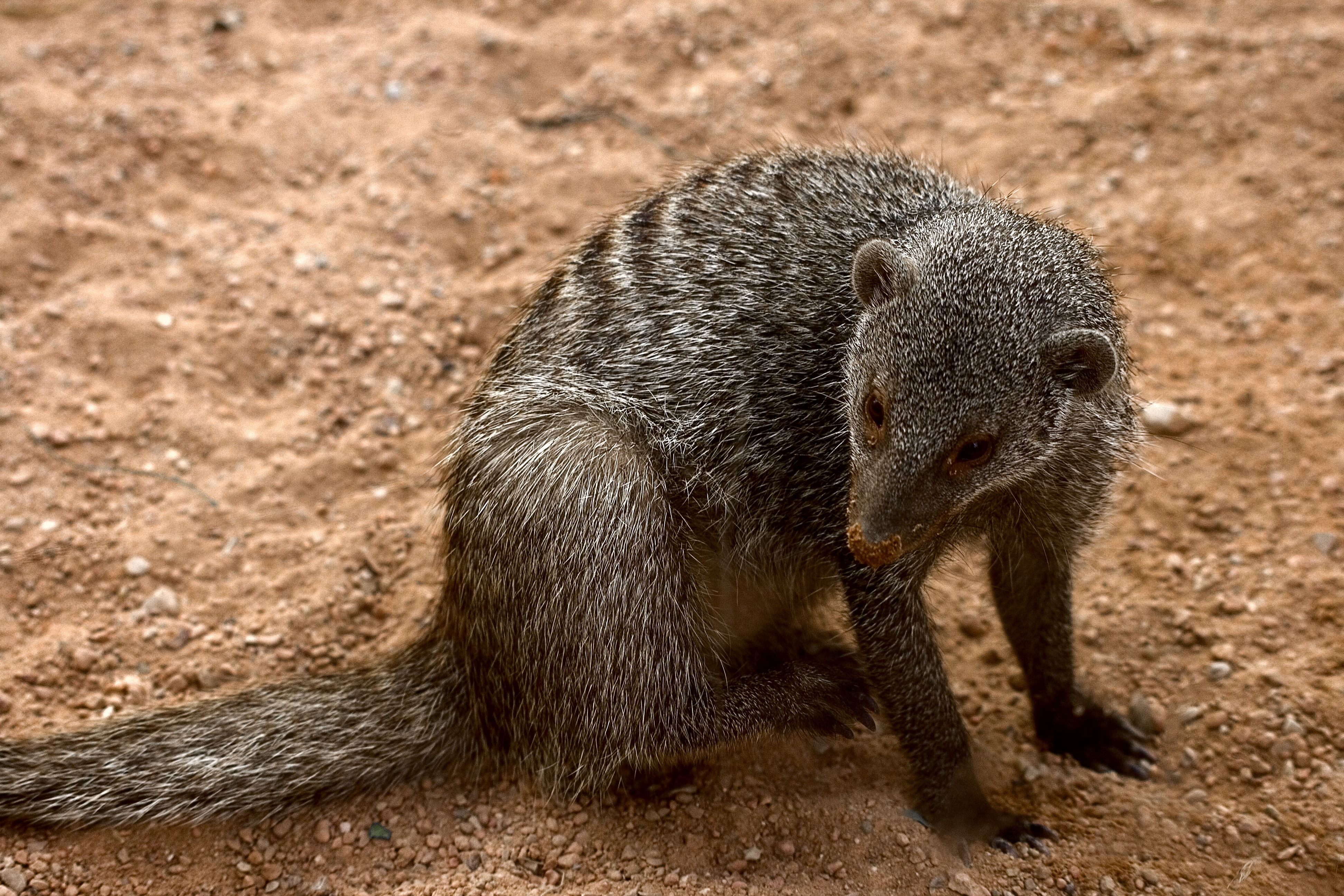 Mangosta rayada. Estrictamente diurnas viven en grupos que pueden alcanzar los 40 miembros. Basándose en estudios científicos, parece que se trata de un sistema matriarcal (Skinnr &Smithers, 1990) en el que unas pocas hembras se reproducen. La jerarquía entre los individuos del grupo parece estar basada más en la edad, tamaño y temperamento de los individuos que en el sexo.